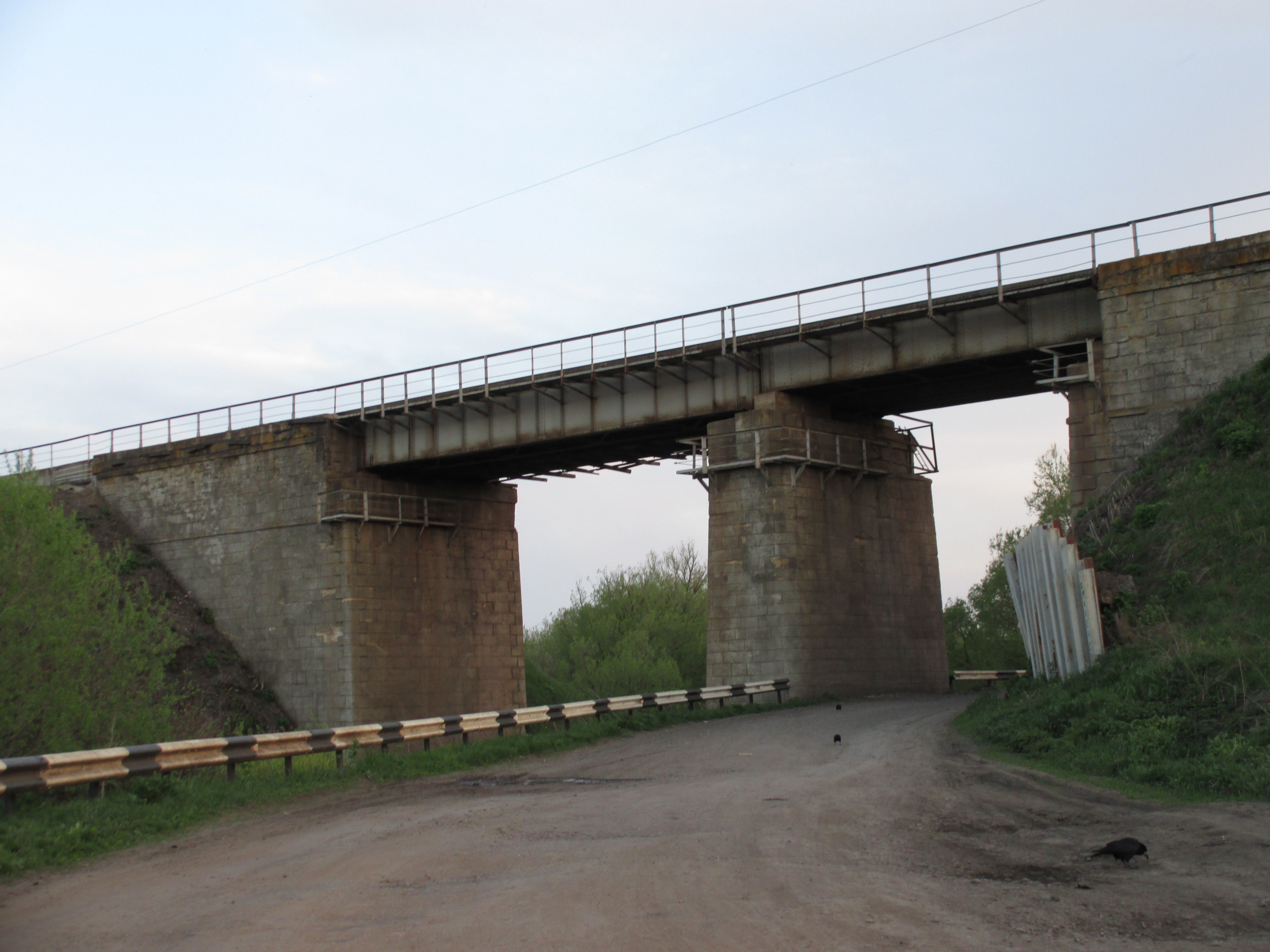 Путепровод на участке Платоновка - Иноковка недалеко от села Никольское и о.п. 533 км